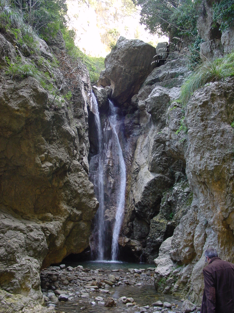 Parco dei Nebrodi, Sicily Cascata del Catafurco